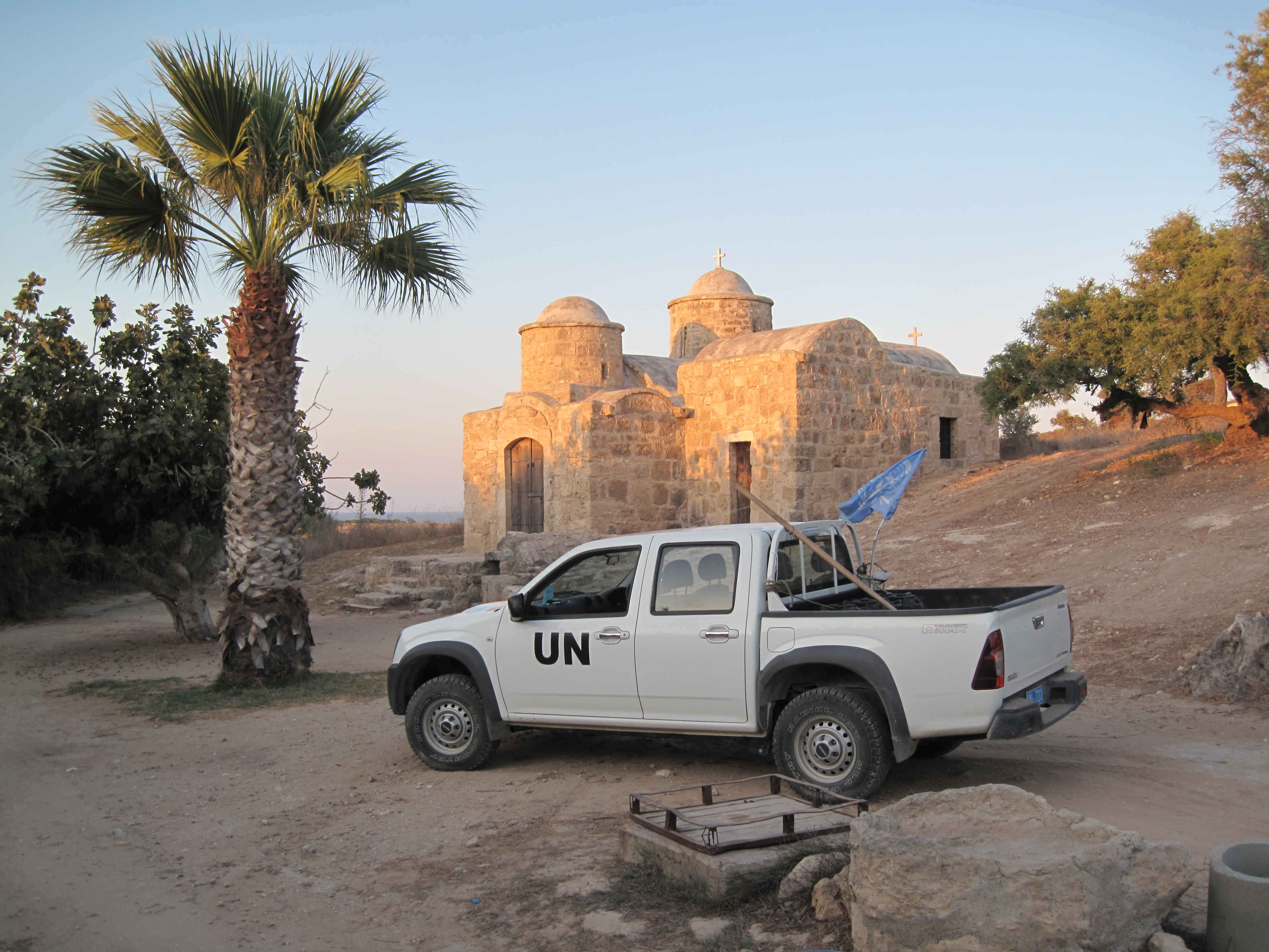 un patrouille in bufferzone near Church of Ayia Marina